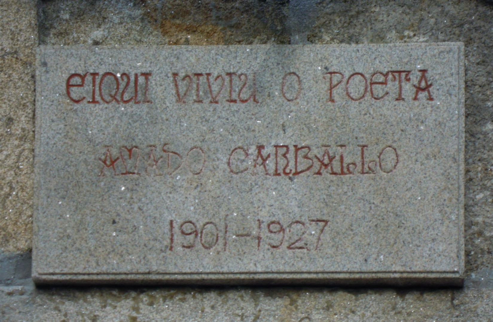 Placa na casa do poeta pontevedrés Luís Amado Carballo, no número 1 da rúa de Cobián Roffignac de Pontevedra.